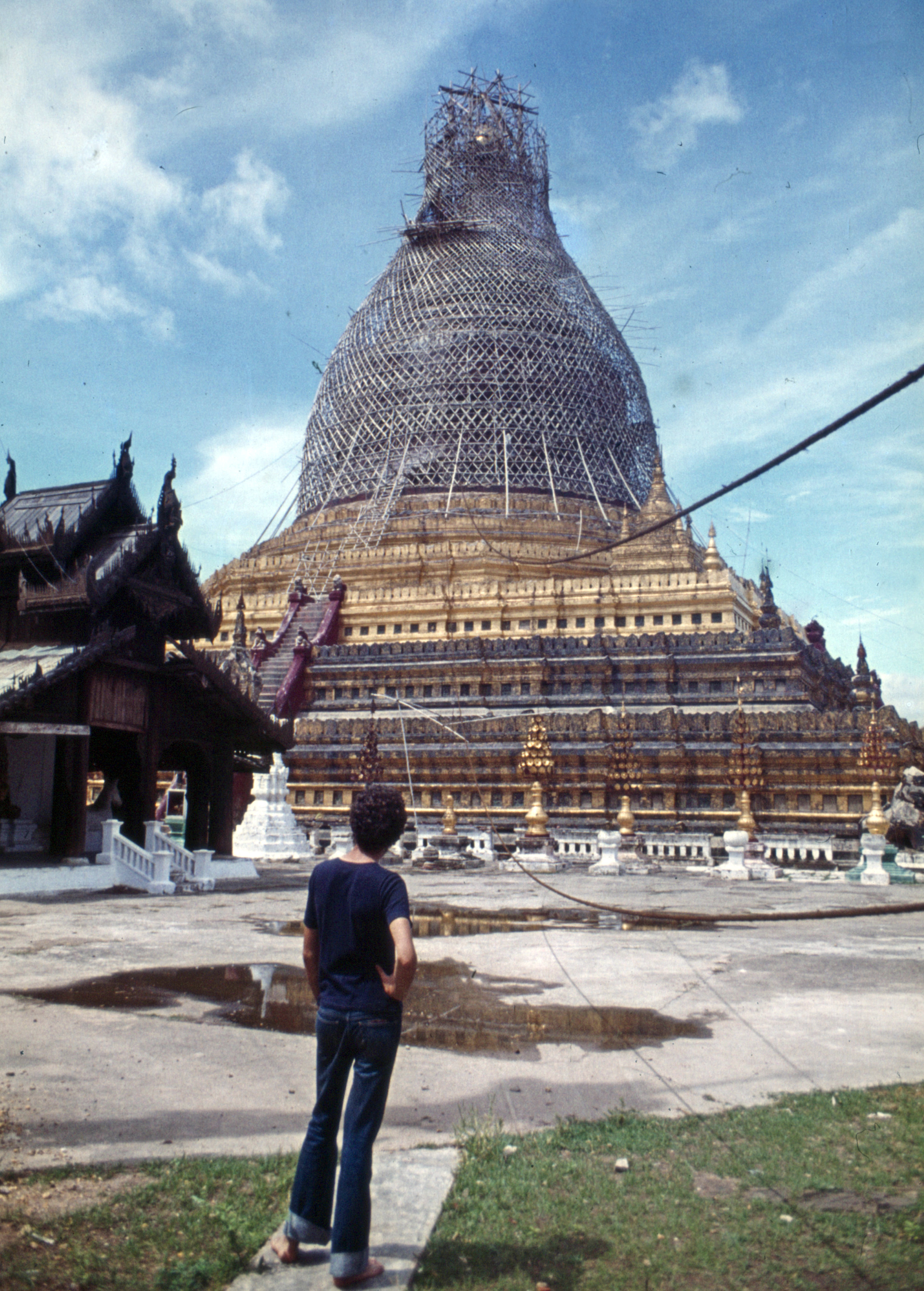 Bagan 1976